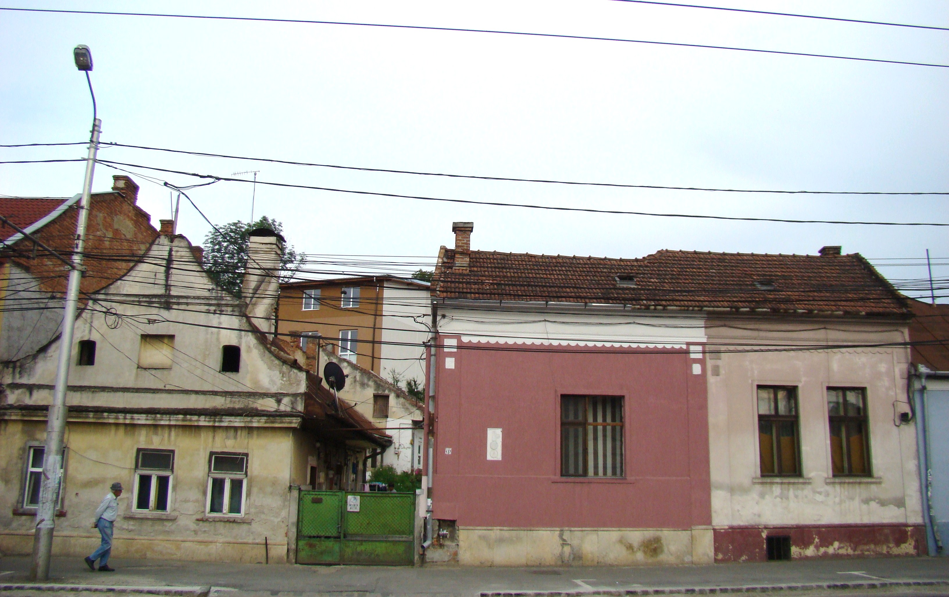 Clădire monument istoric, Calea Moților, nr. 137 (foto, stânga)